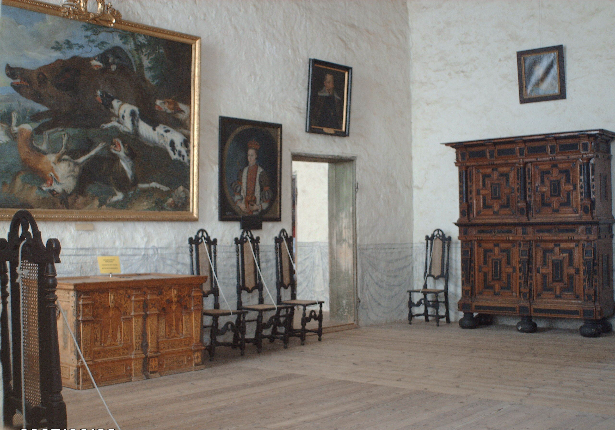 Drawing Room at Vadstena Castle, Sweden.